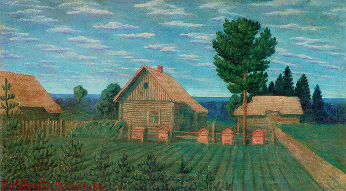 1952 г. Матэр'ял і тэхніка палатно, алей Памеры 65,5 х 118 Месцазнаходжанне Нацыянальны гістарычны музей Рэспублікі Беларусь